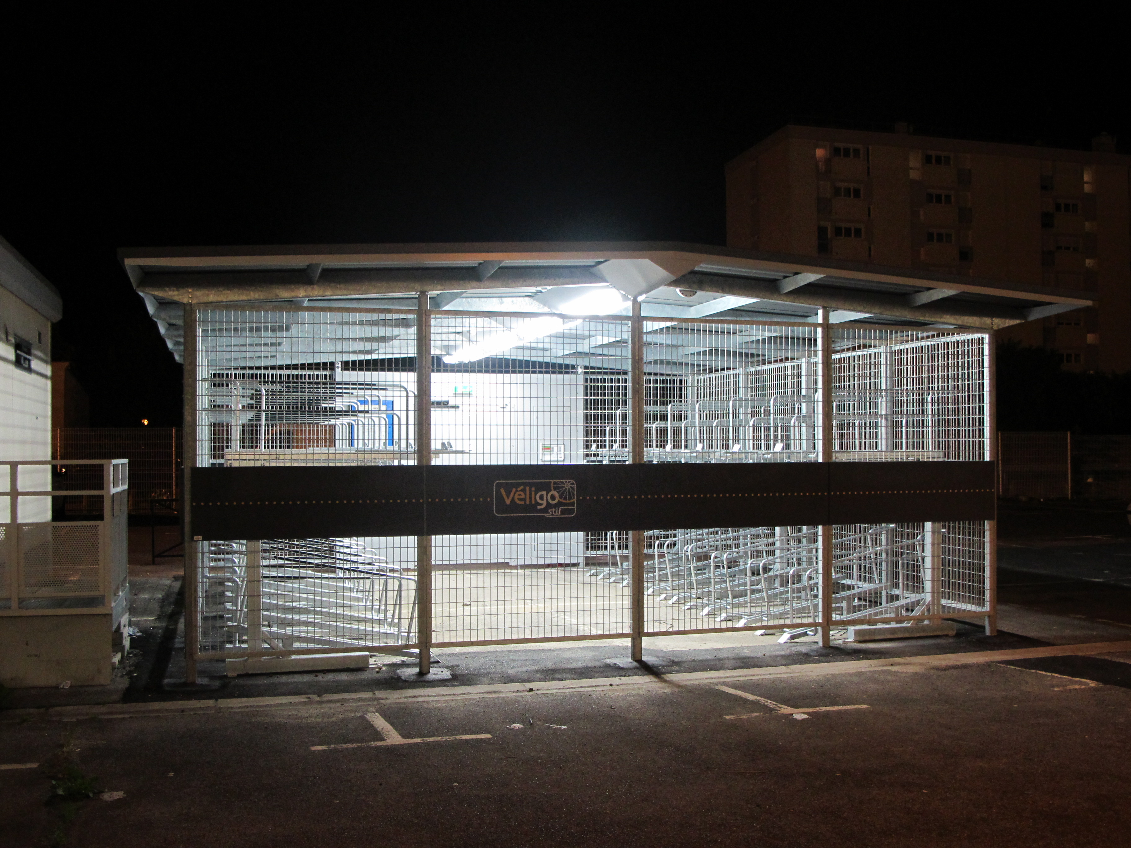 L'abri à vélo Véligo de la gare de Corbeil-Essonnes, Corbeil-Essonnes, Essonne, France.